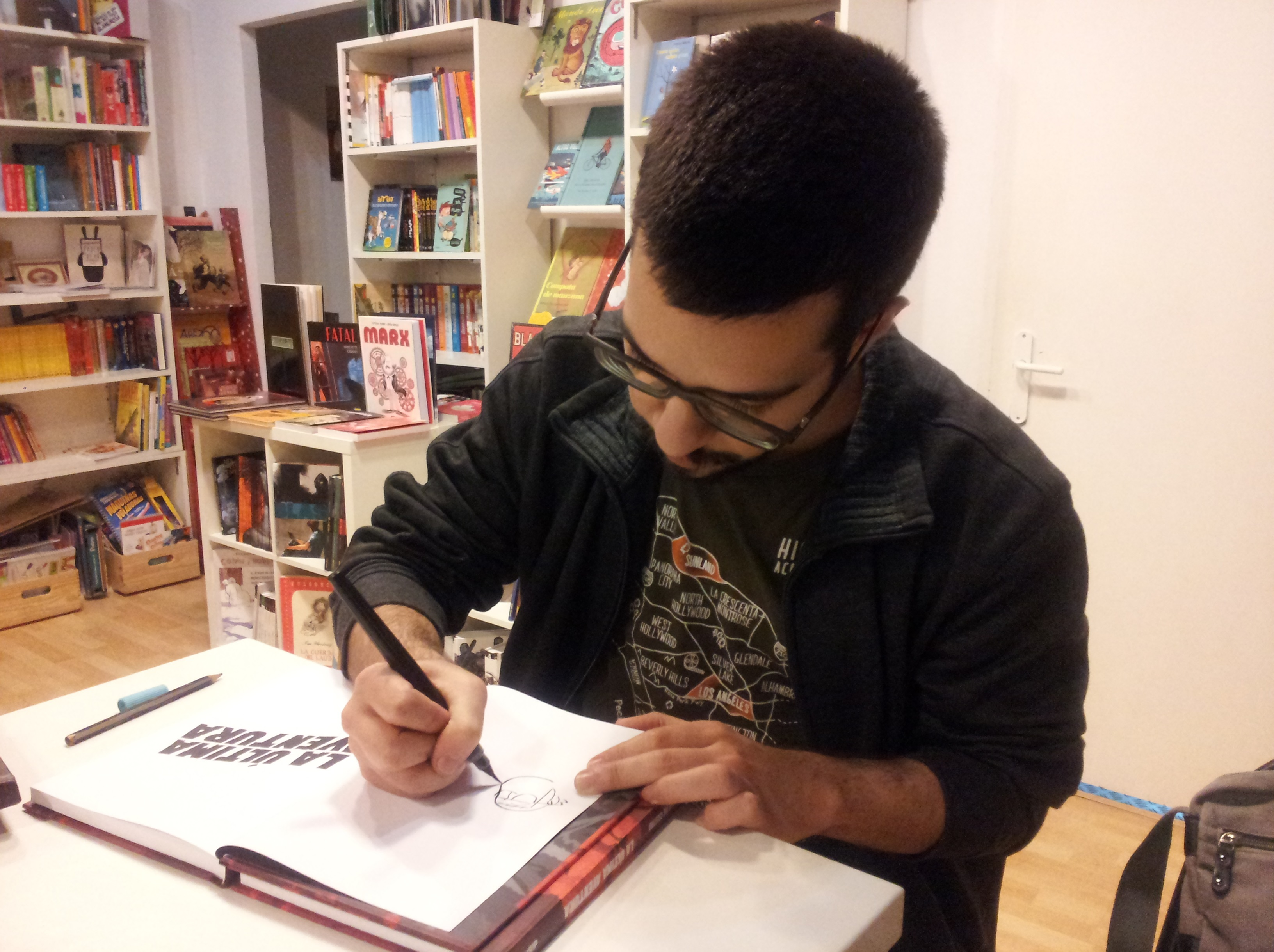 Llibreria Bartleby, Russafa. Javi de Castro signant exemplars.